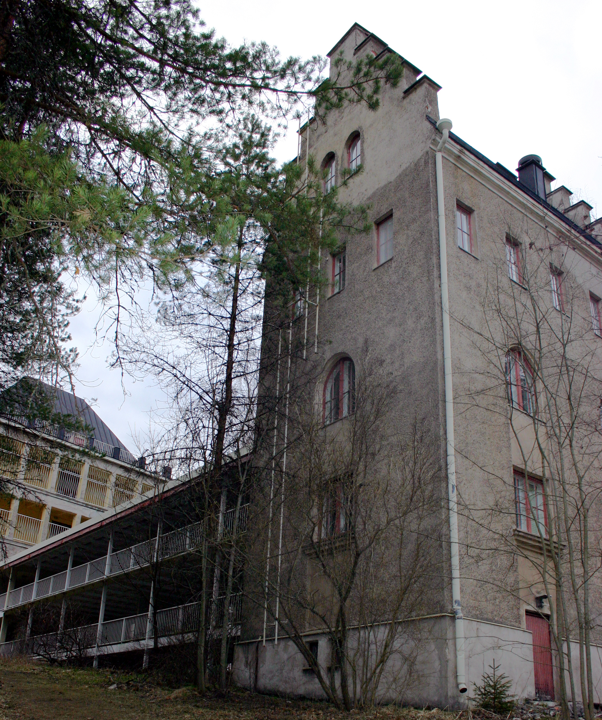 Nummelan parantolan makuuhalleja kuvattuna huhtikuussa 2007.